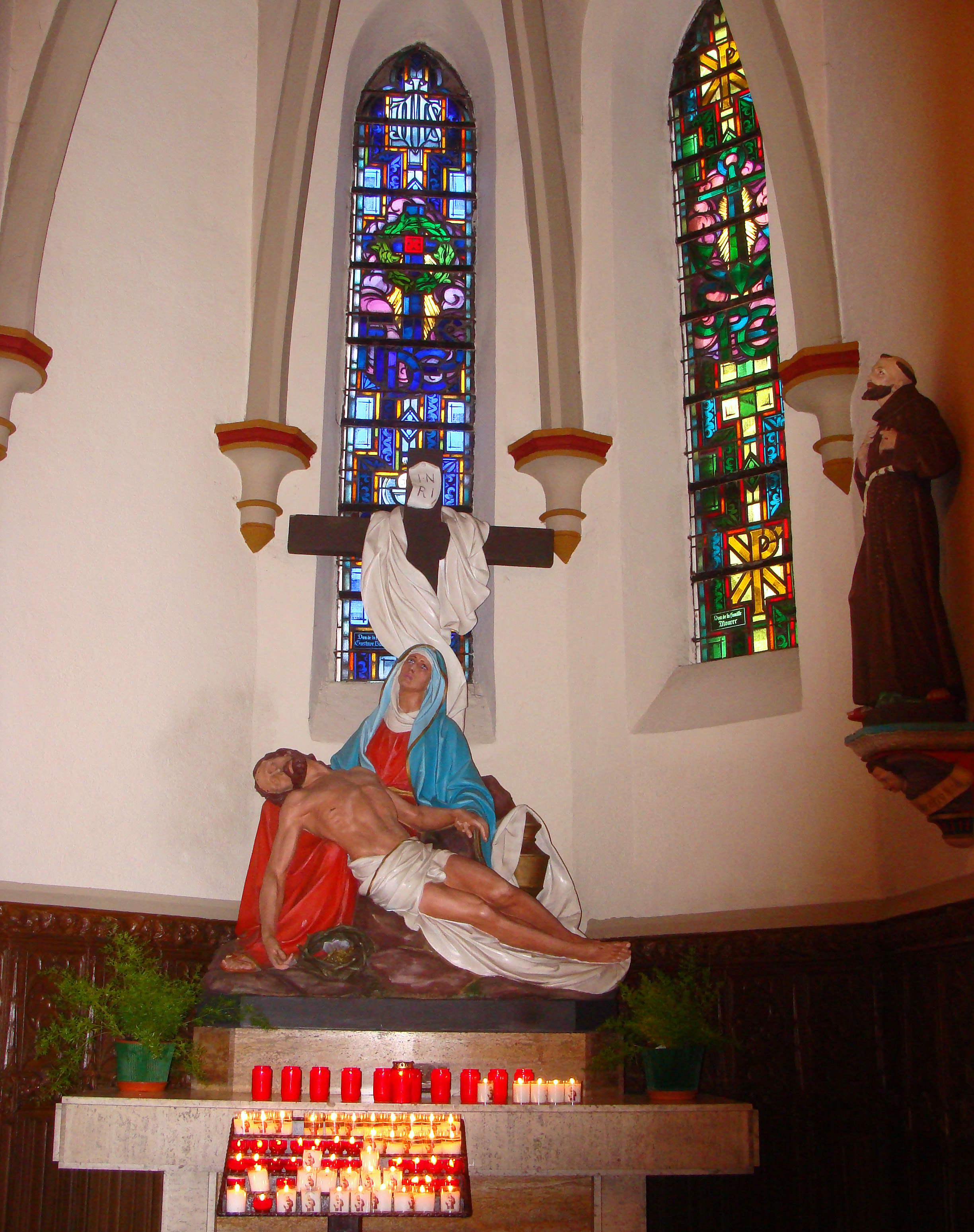 église Saint-Nicolas, L'Hôpital (Moselle), chapelle d'entrée (1882).